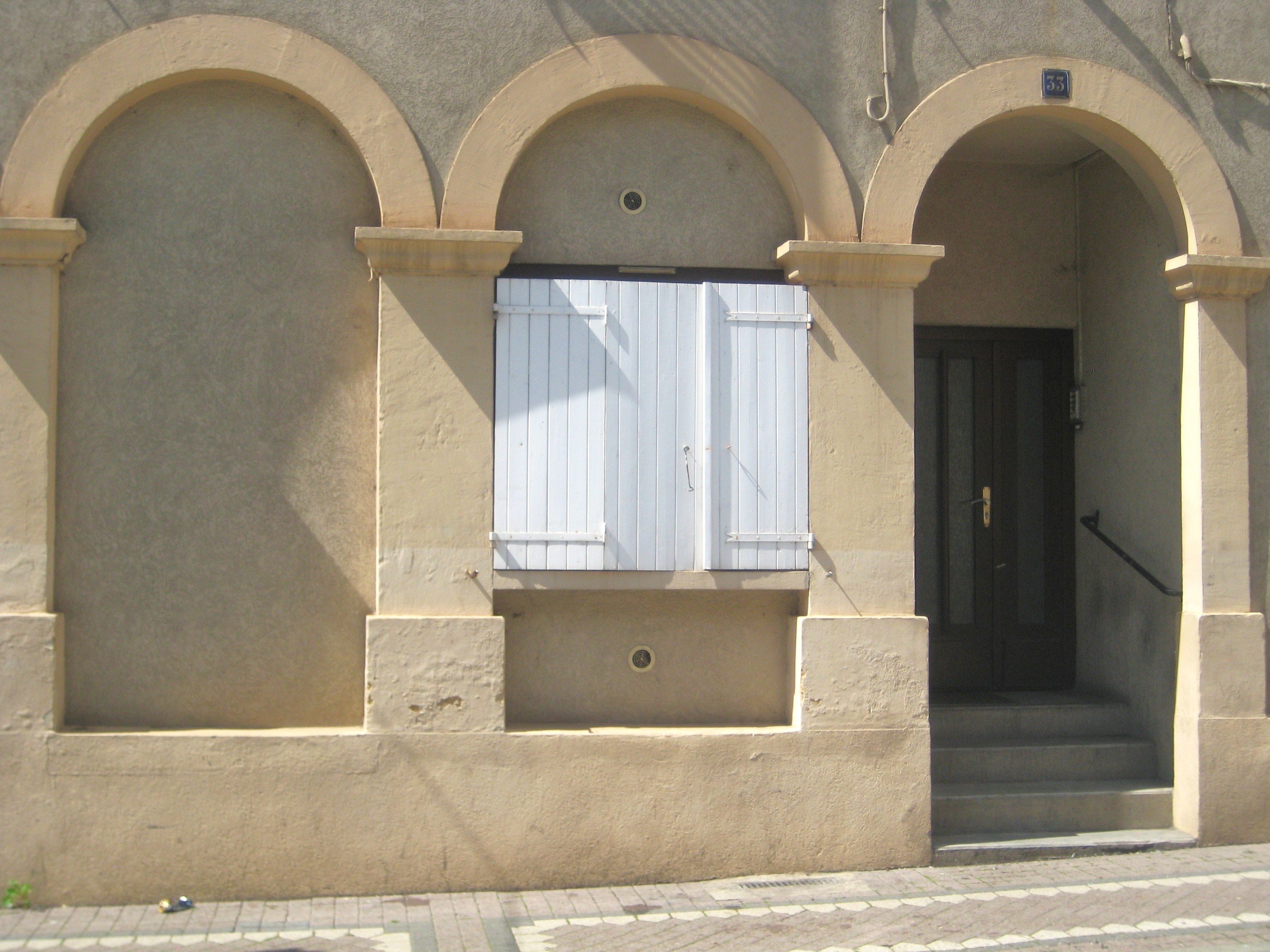 Description ancienne chapelle italienne Moyeuvre Date6 September 2011Sourcemon appareil photoAuthorAimelaimePermission (Reusing this file) ancienne chapelle italienne Moyeuvre